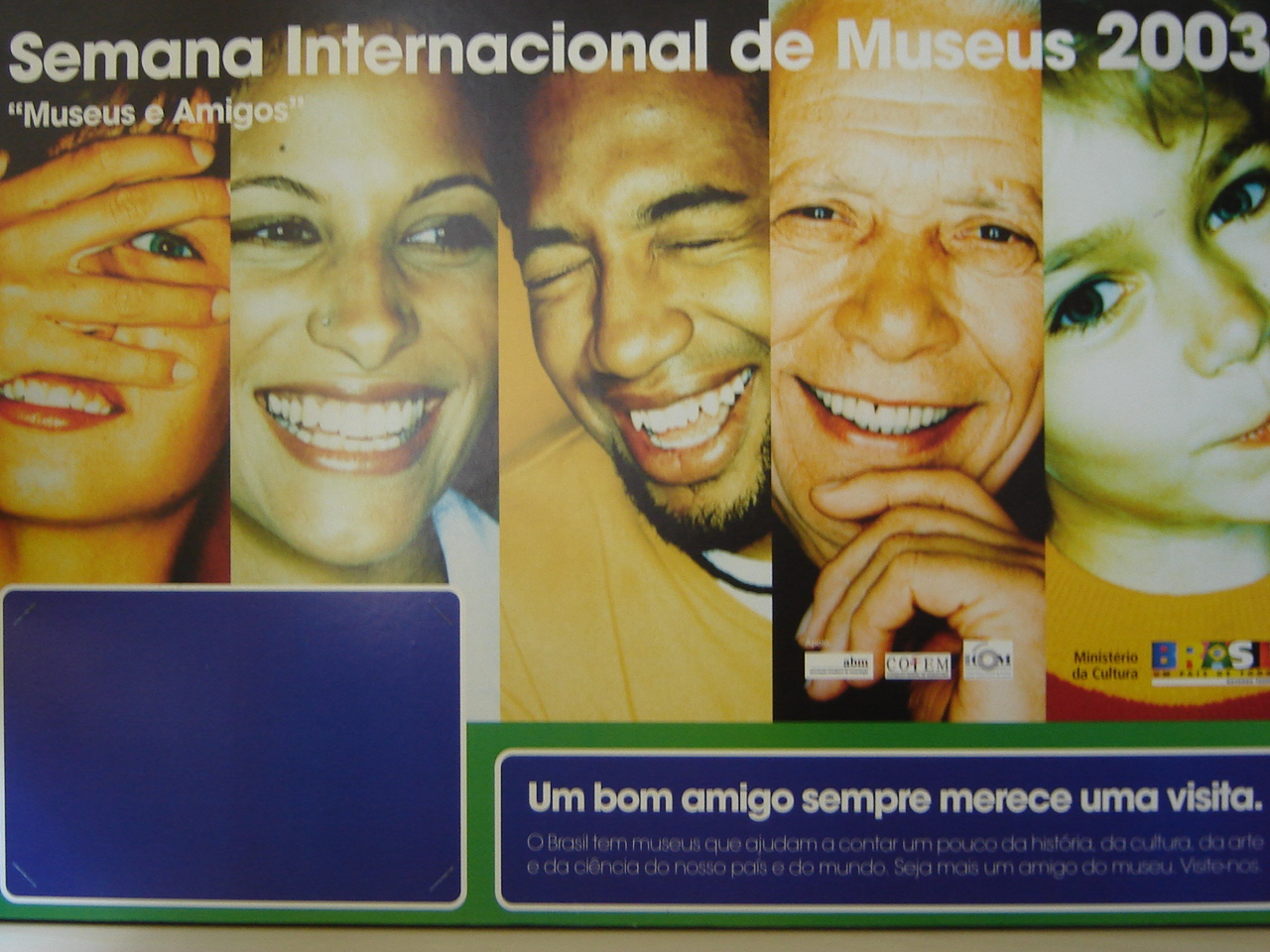 Cartaz 1ª Semana Internacional de Museus 2003.